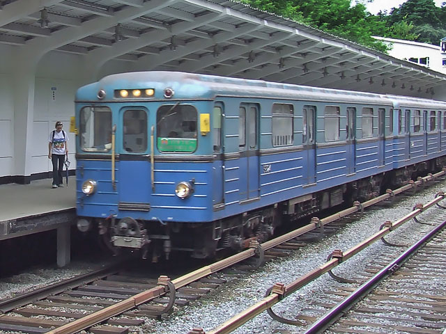 Вагон метро типа Еж3 №5824 (путеизмеритель) на станции Фили